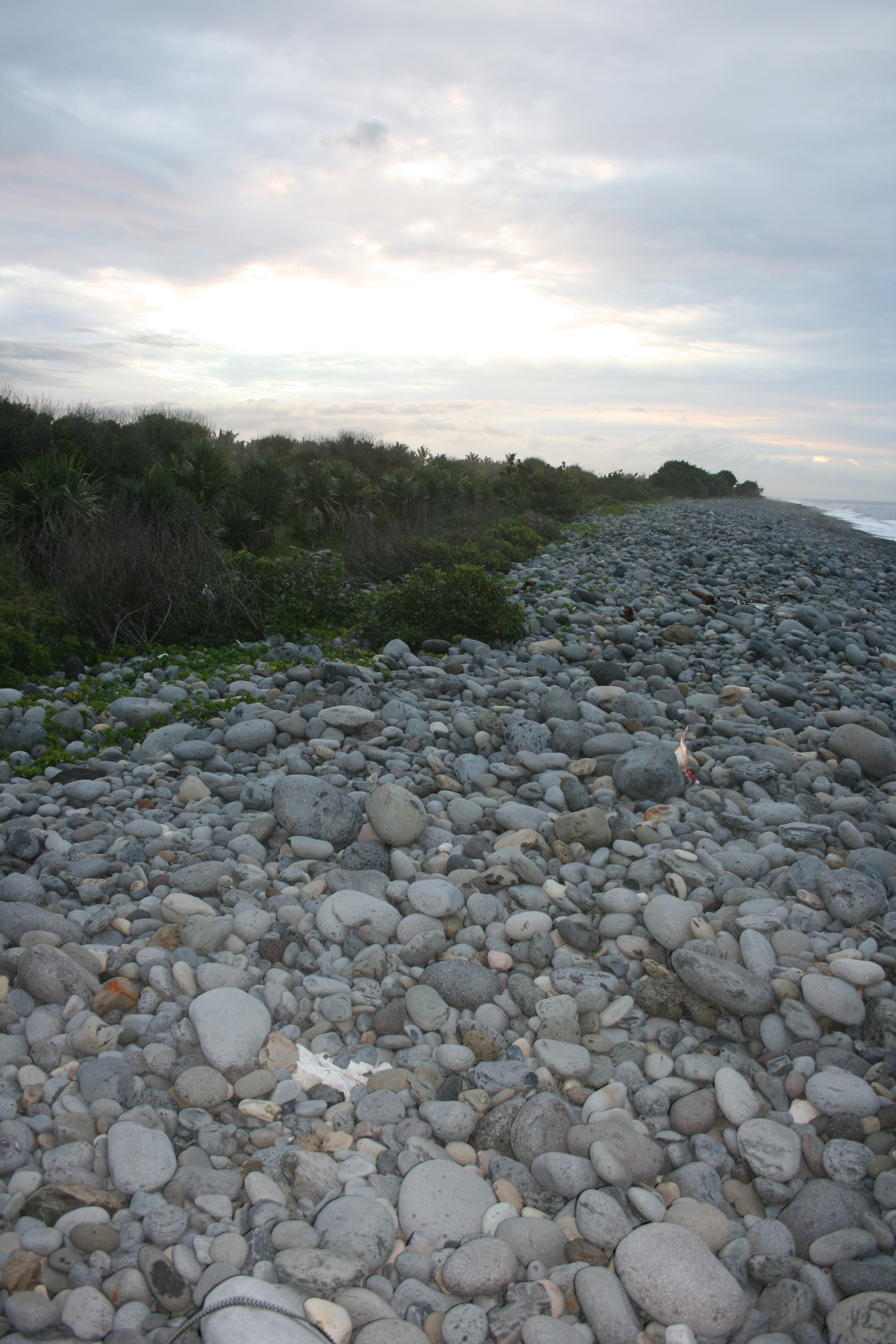 La côte bordant le bord-est du parc du Colosse, à Saint-André de la Réunion